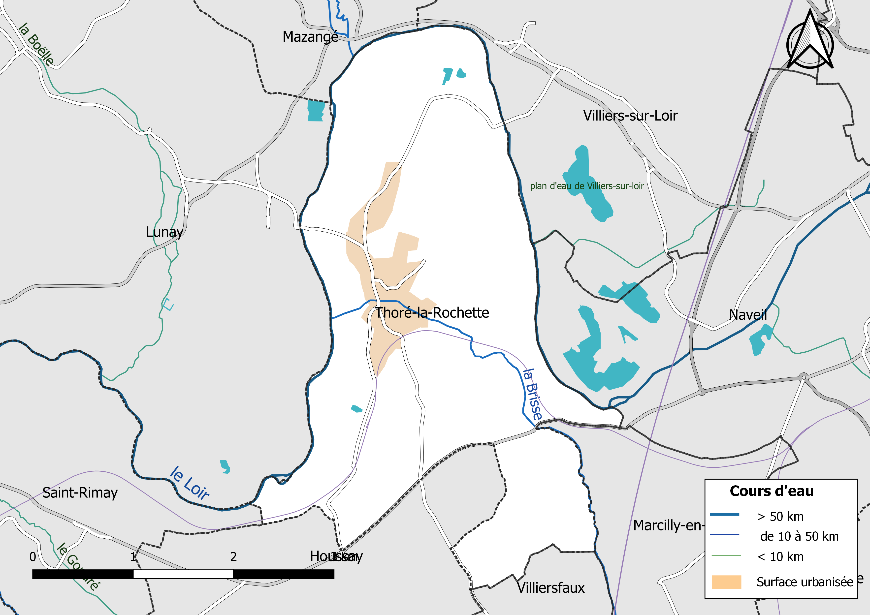 Carte du réseau hydrographique de la commune de Thoré-la-Rochette (Loir-et-Cher, France).